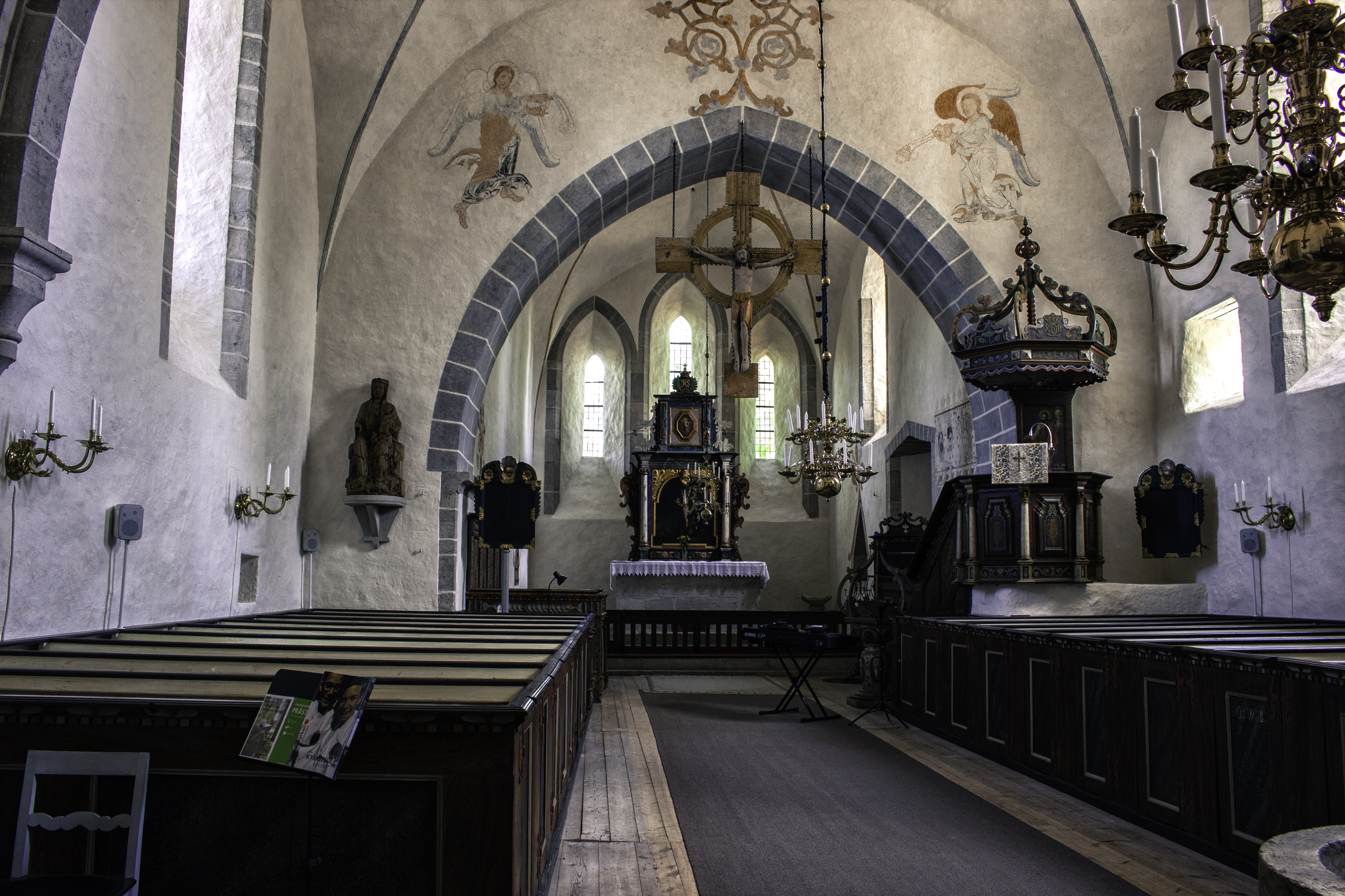 Interior da igrexa de Hejnum, na illa sueca de Gotland.